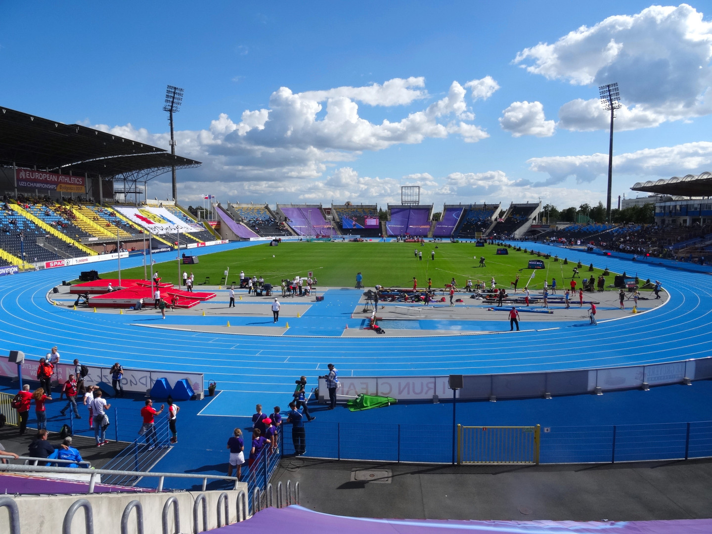 Młodzieżowe Mistrzostwa Europy w Lekkoatletyce U23 w Bydgoszczy 13-16 lipca 2017